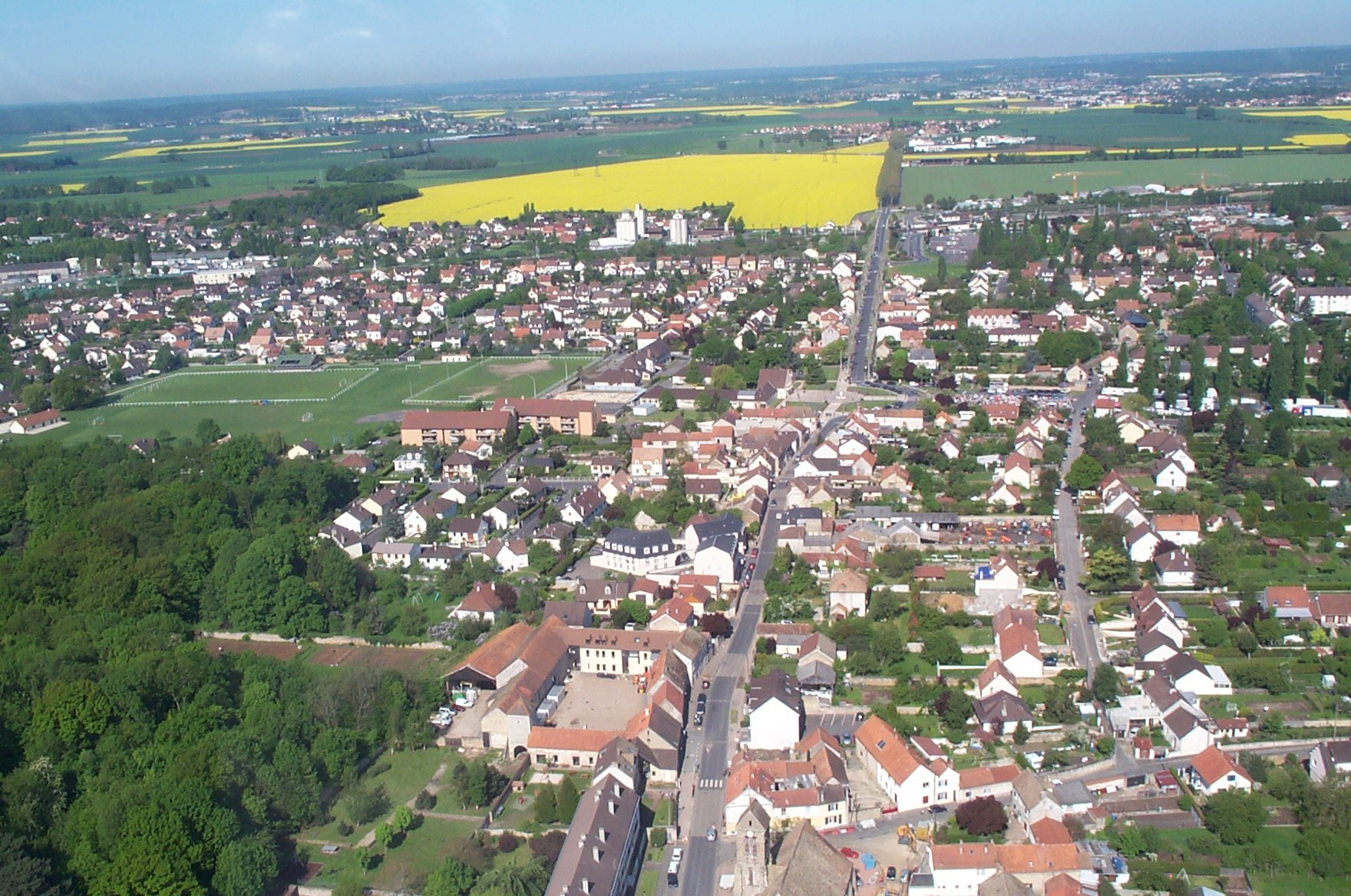 Vue aérienne de Marolles-en-Hurepoix - Essonne (France) au printemps 2004.